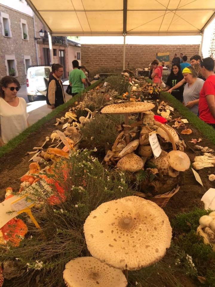 Concurs de la Festa del Bolet de Seva, 2017